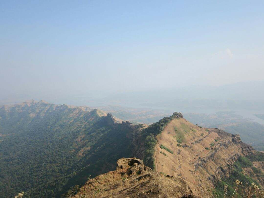 हा गाडा वरून राजगड वर जाण्यचा मार्ग आहे